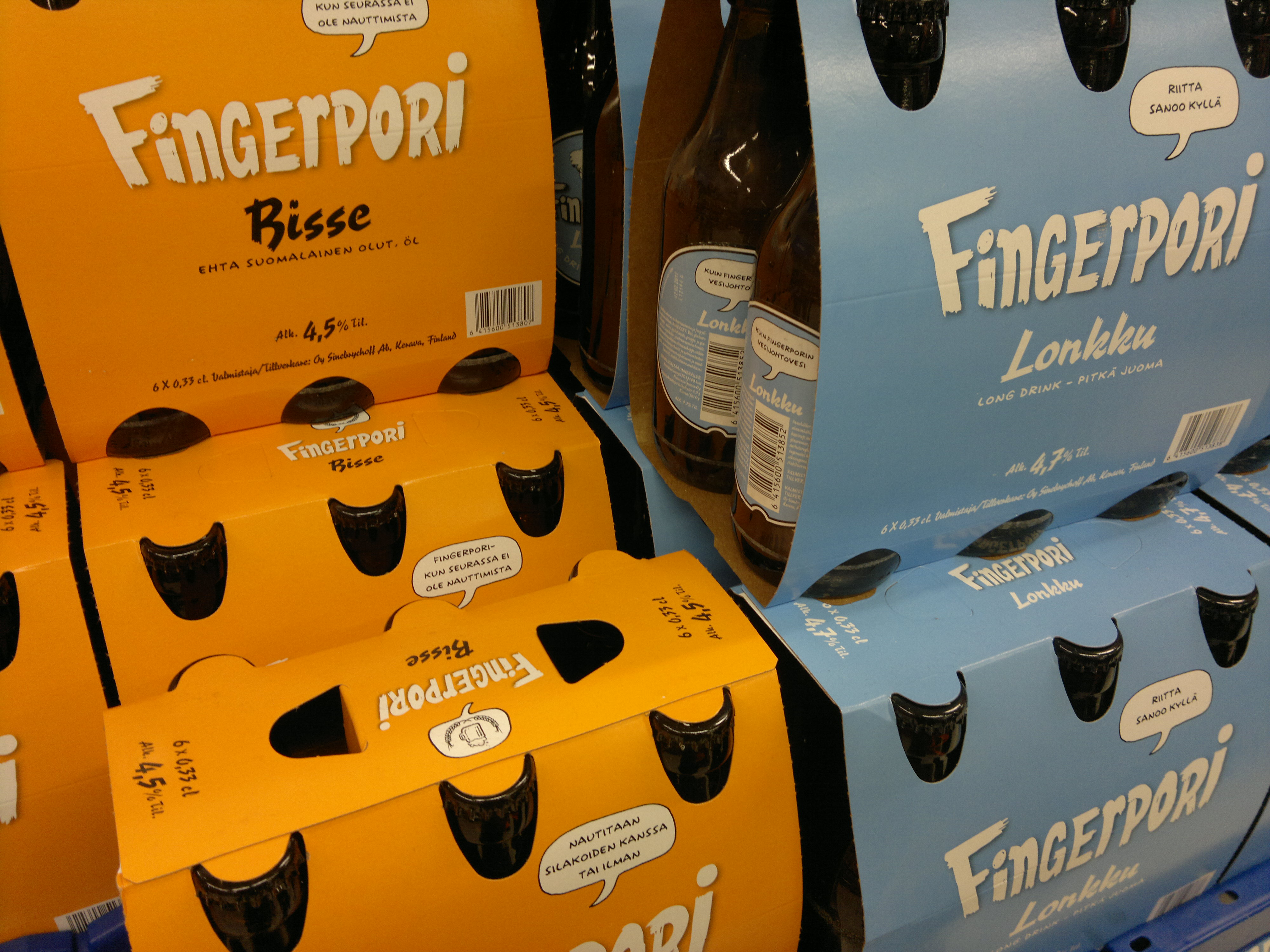 Fingerpori-olutta.